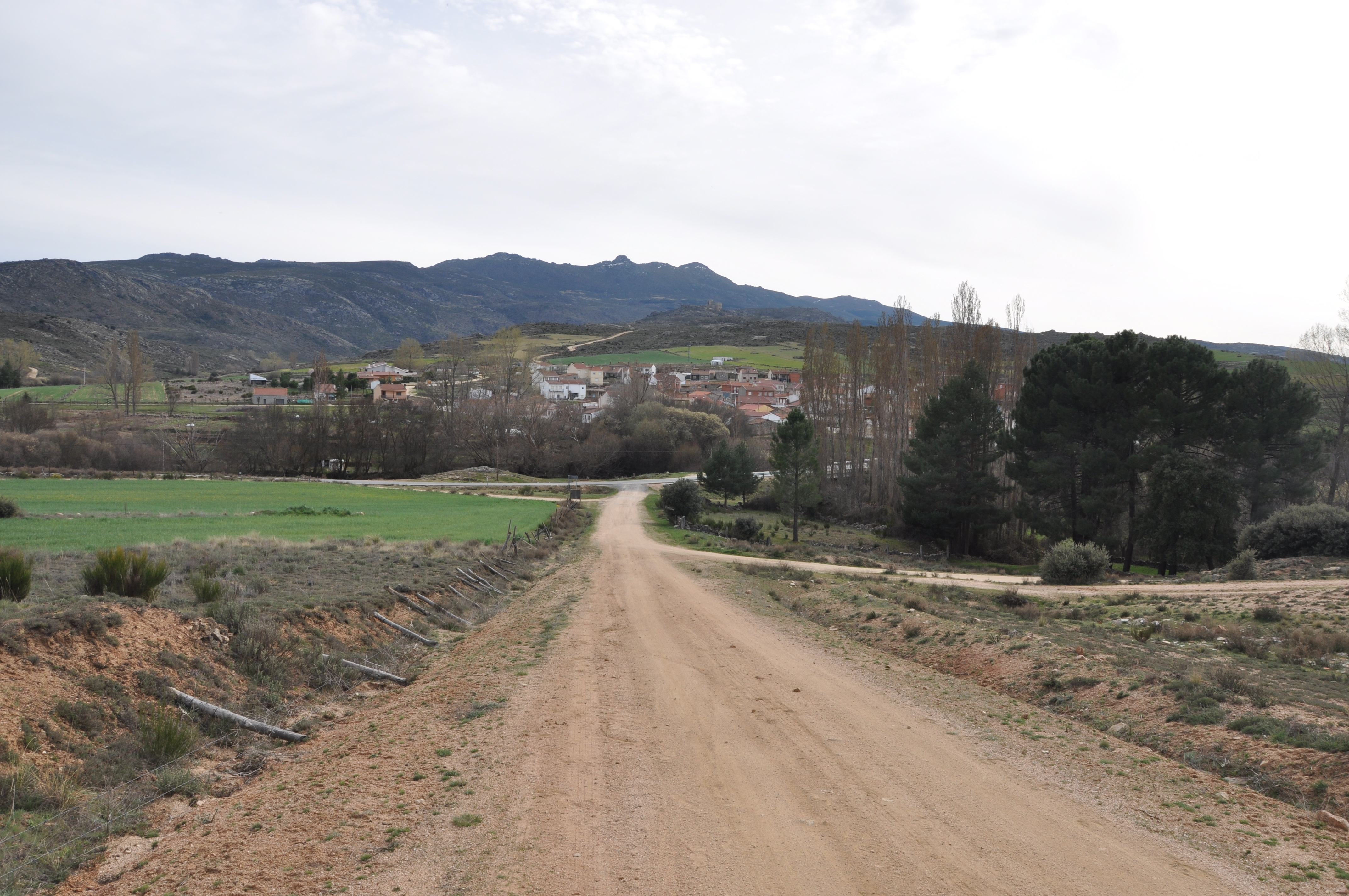 Panorámica de Mironcillo, Ávila, España.